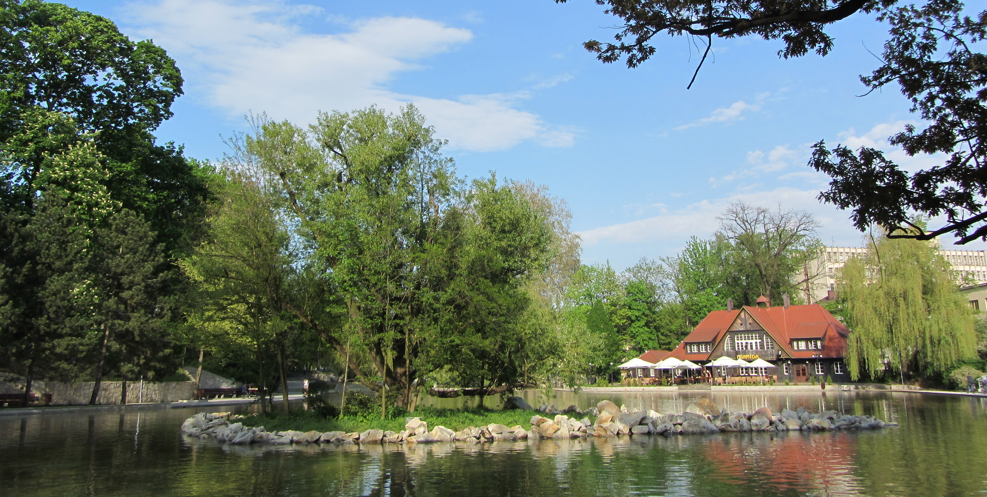 Das Eishaus mit dem Schlossteich in Oppeln/Oberschlesien